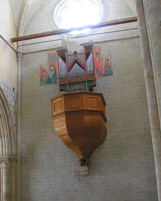 Orgue historique d'époque gothique: Valère (Sion, Suisse, photo: 2008)